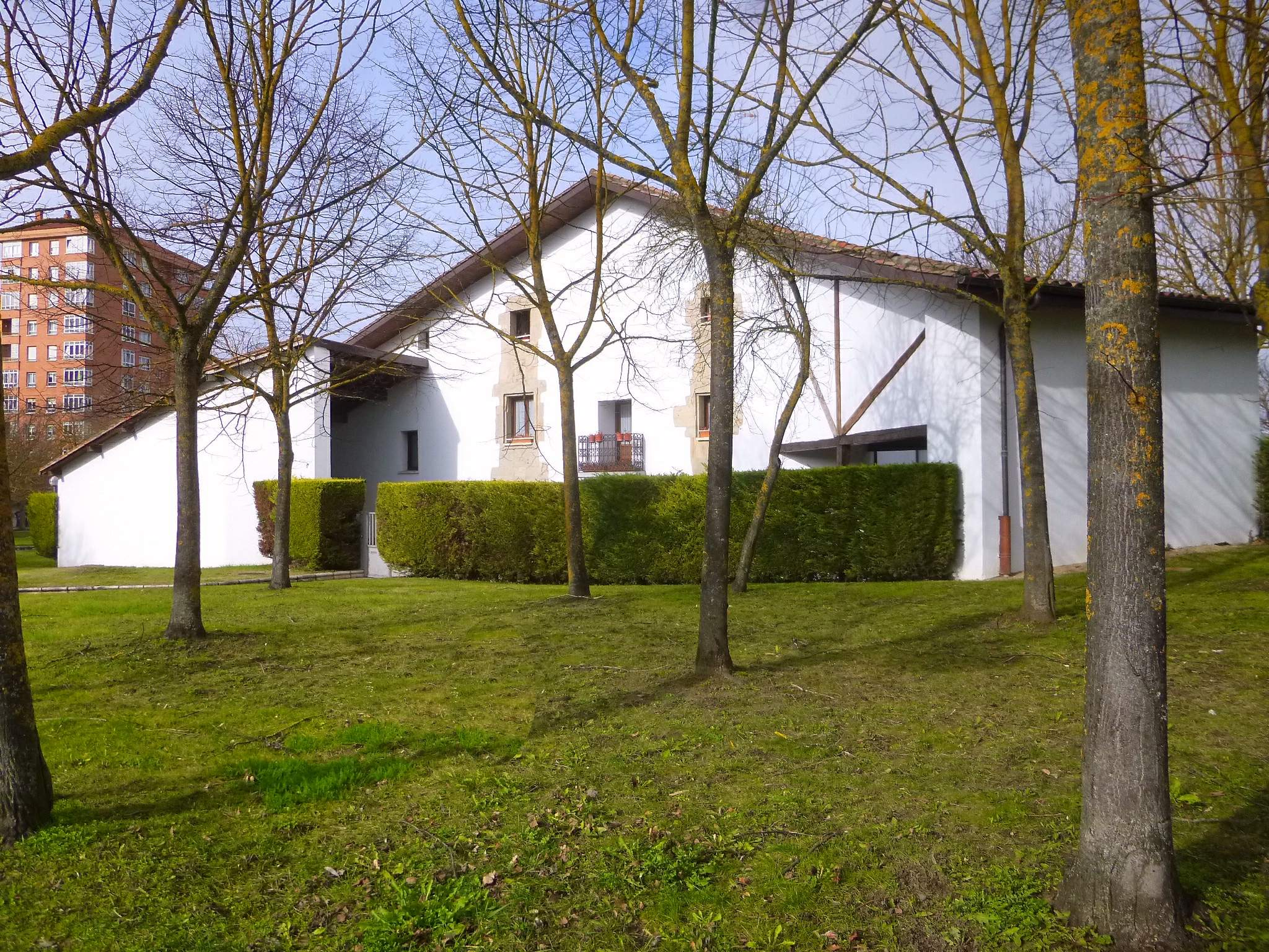 La única antigua casa de labranza que subsiste del pueblo de Arriaga, absorbido por el barrio de Lakua, en Vitoria-Gasteiz